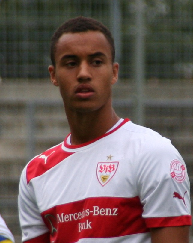 Jerome Kiesewetter beim Spiel gegen den 1. FC Heidenheim. Aufgenommen von